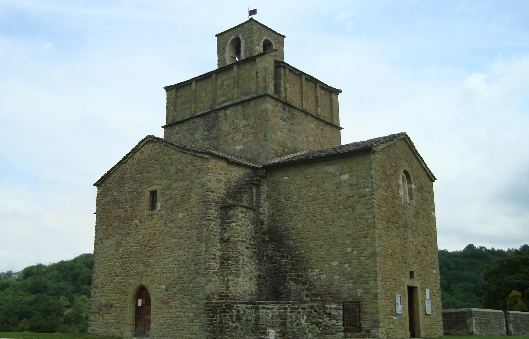 Eglise Saint-Pierre-et-Saint-Paul, Comps, Drôme